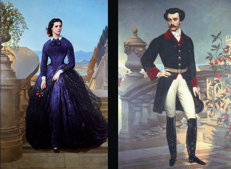 Retratos de los multimillonarios empresarios chilenos del siglo XIX Isidora Goyenechea y Luis Cousiño realizados en París